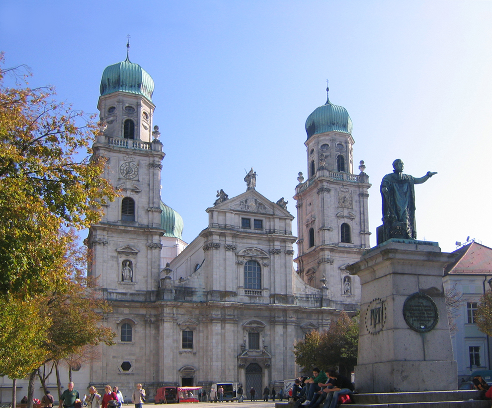 Dom St. Stephan - Passau, Domplatz